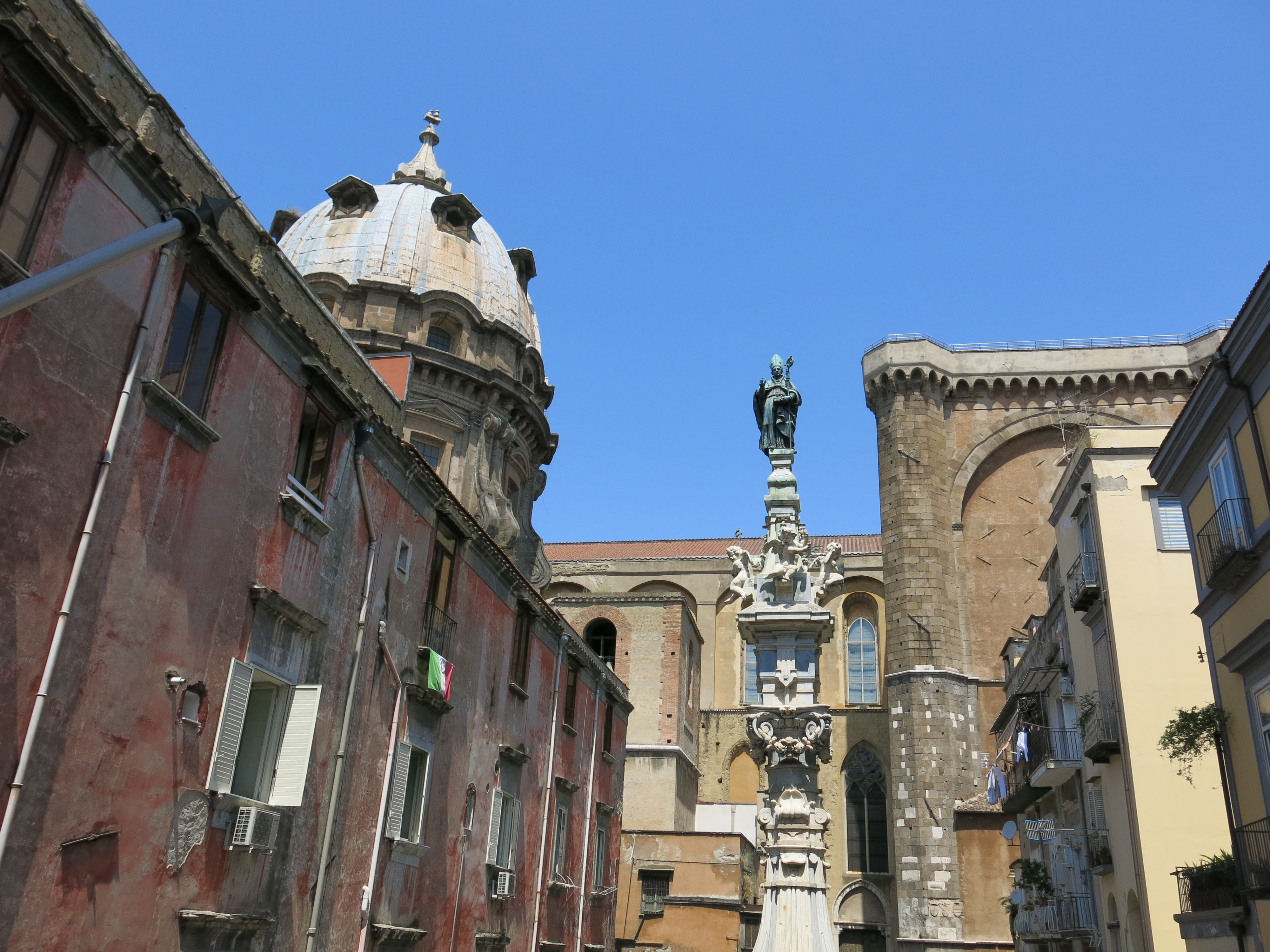 Le chiese di Napoli